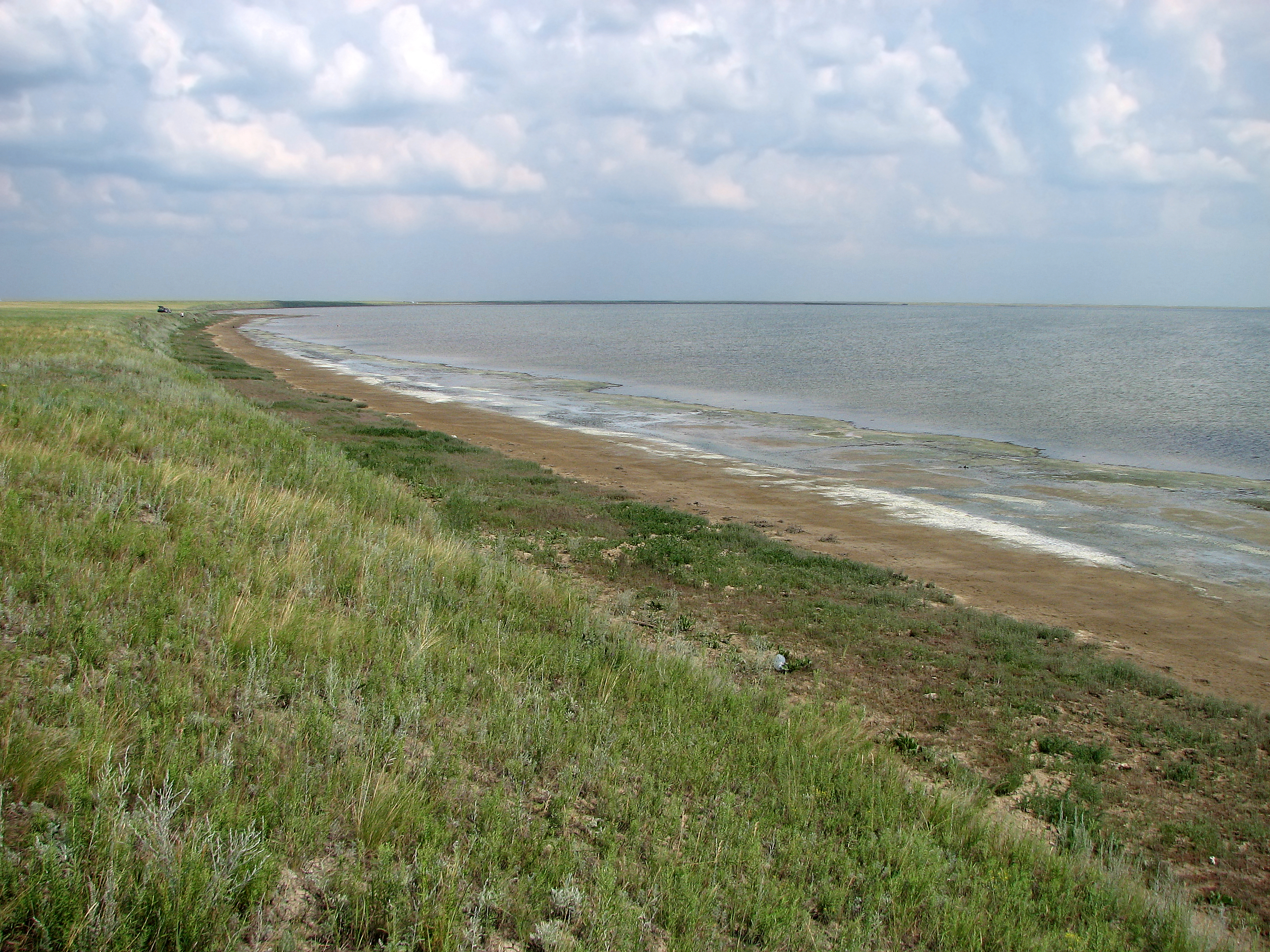 Фотография озера Ульжай